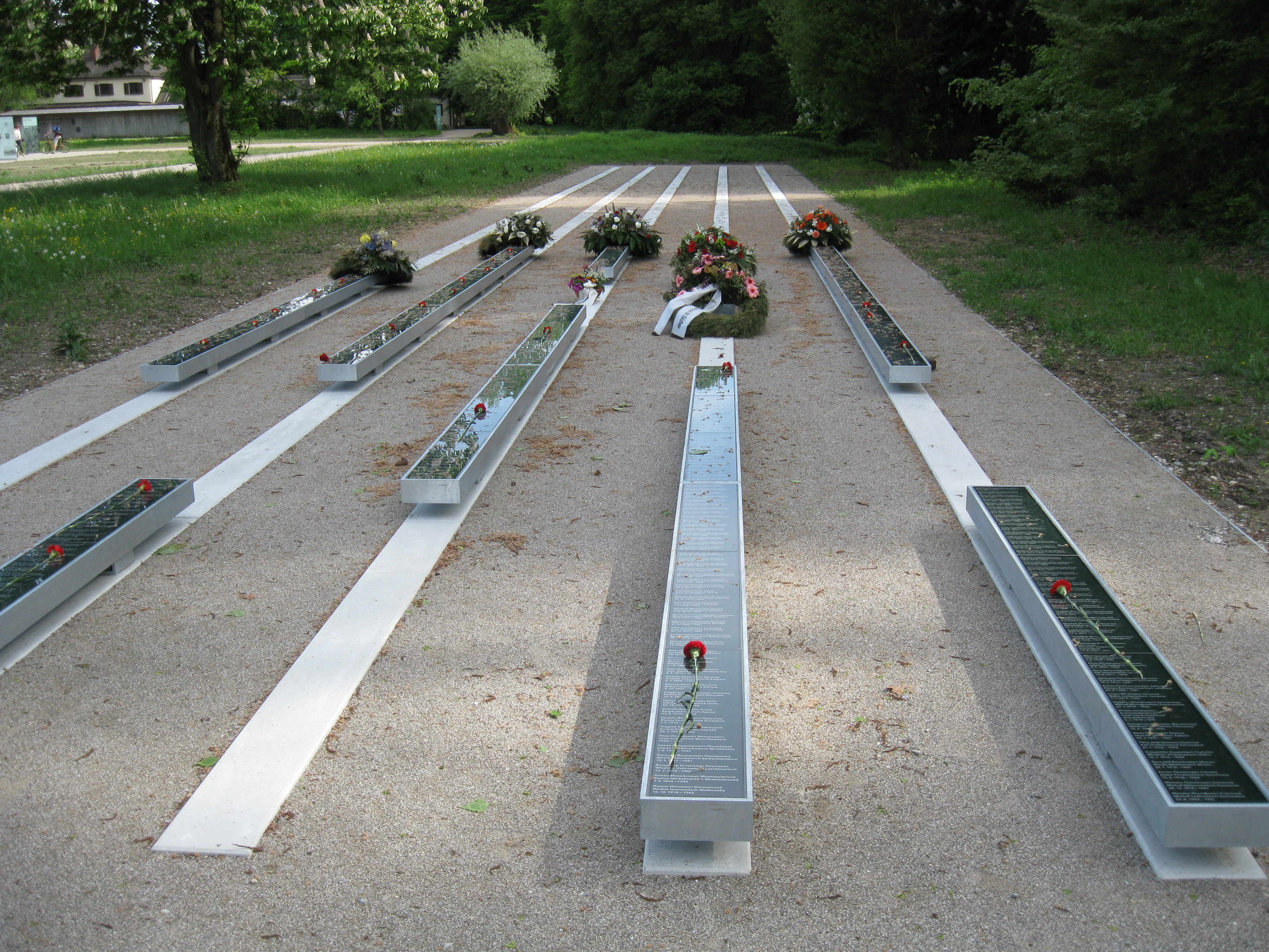 Schießplatz Hebertshausen